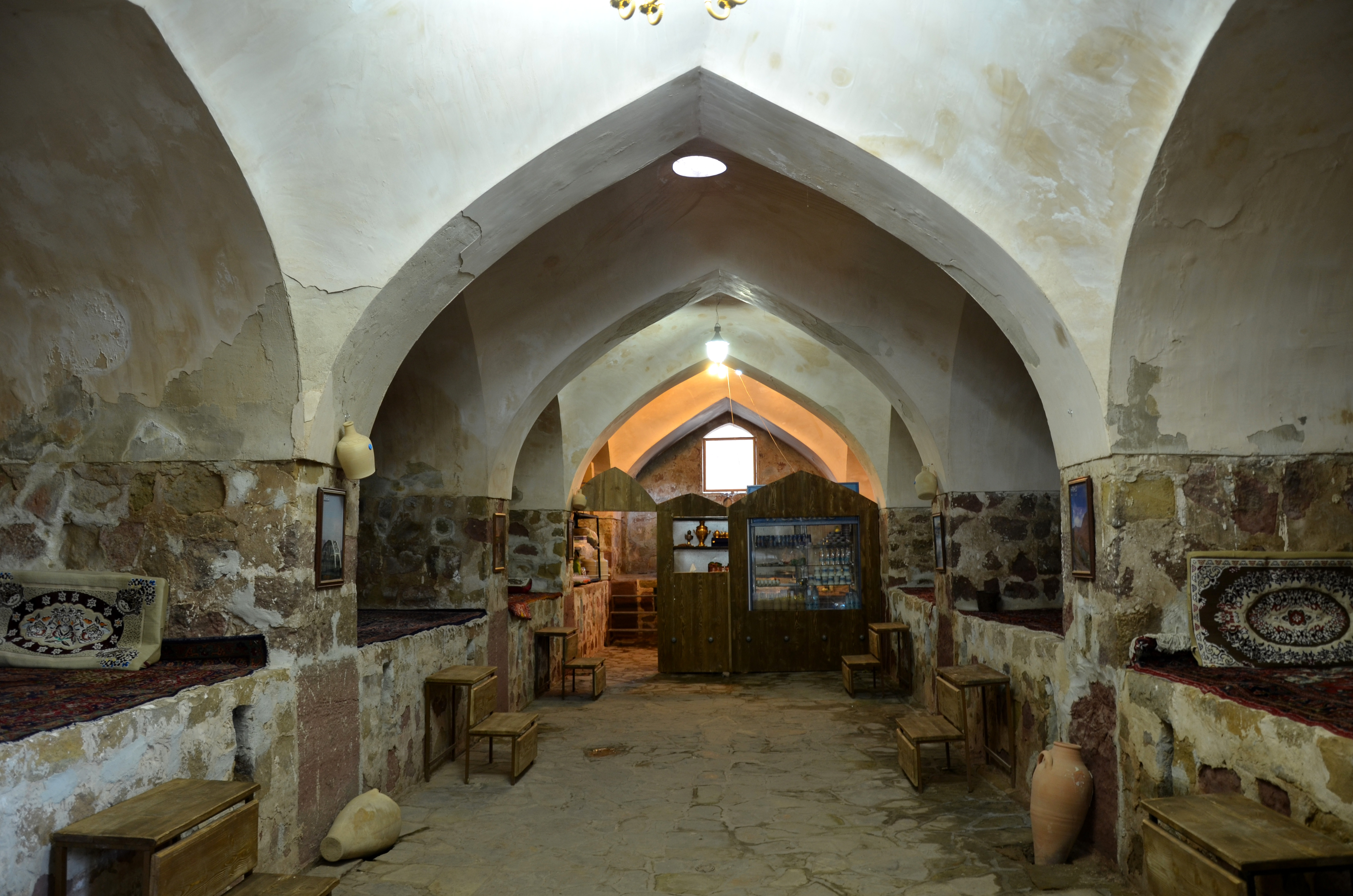 Jolfa - Khaje nazar caravanserai